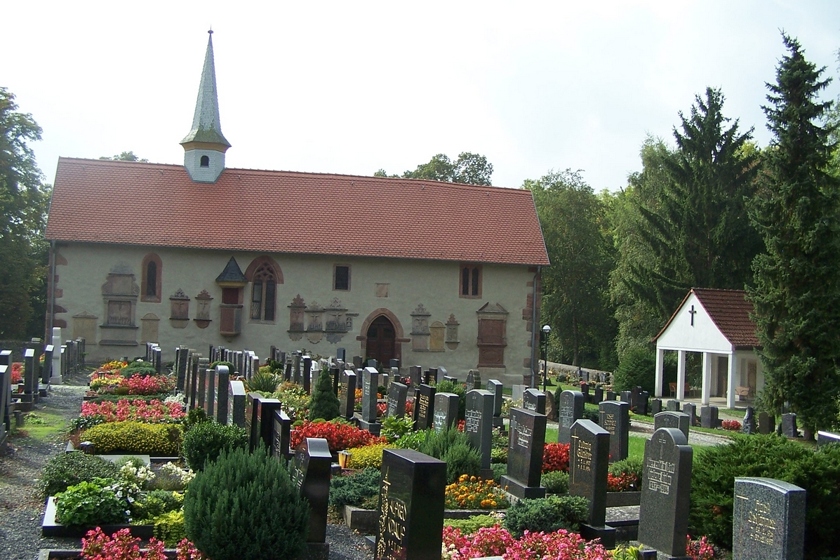 Blick von Norden über den Friedhof zur Kapelle.